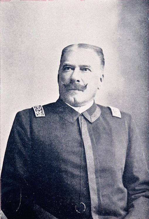 Vicealmirante D. Daniel de Solier (1902)